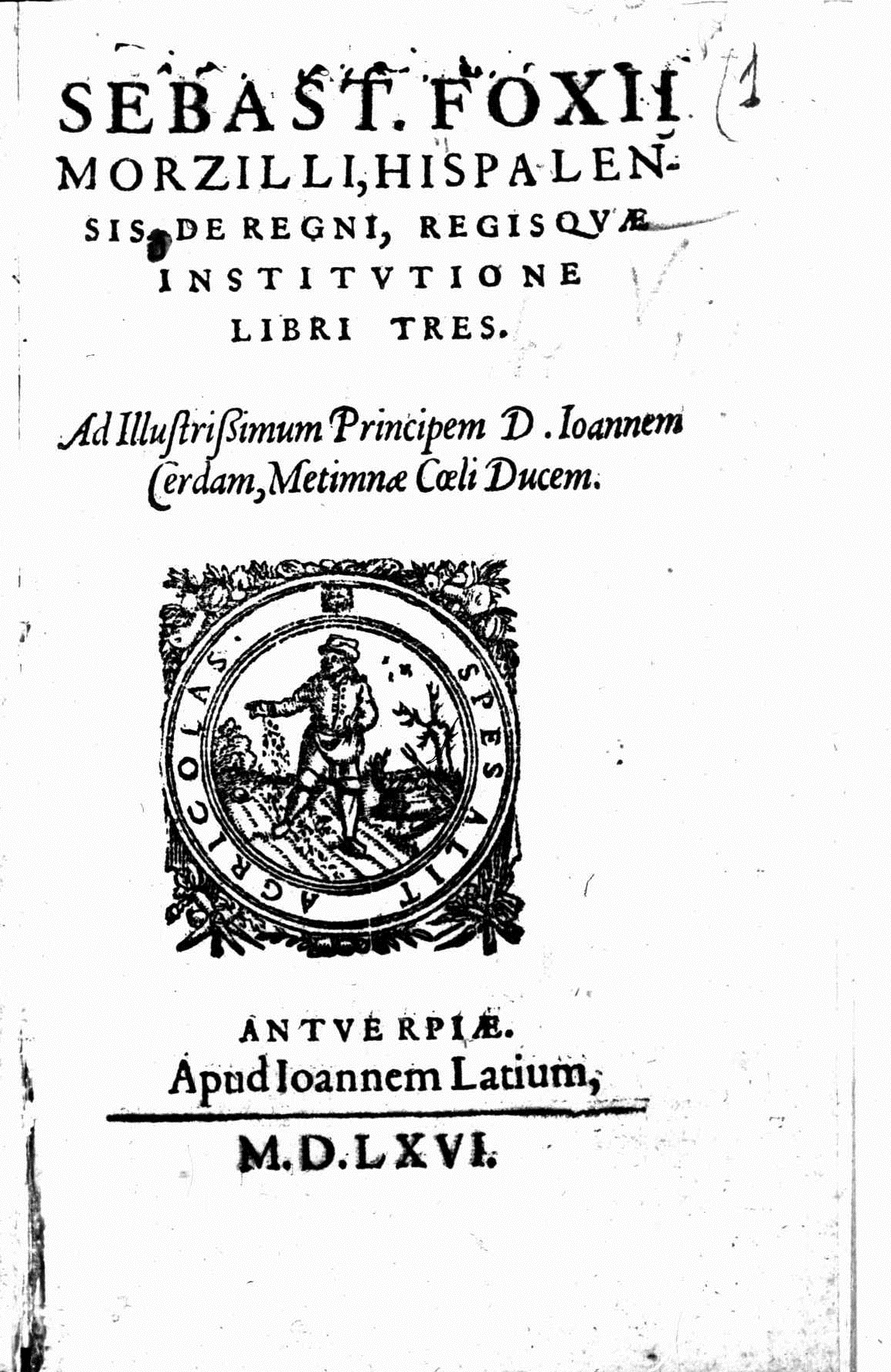 Frontespizio